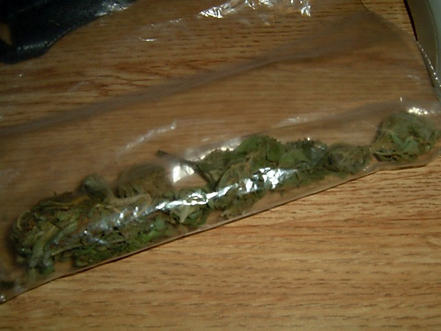 מריחואנה בשקית ניילון